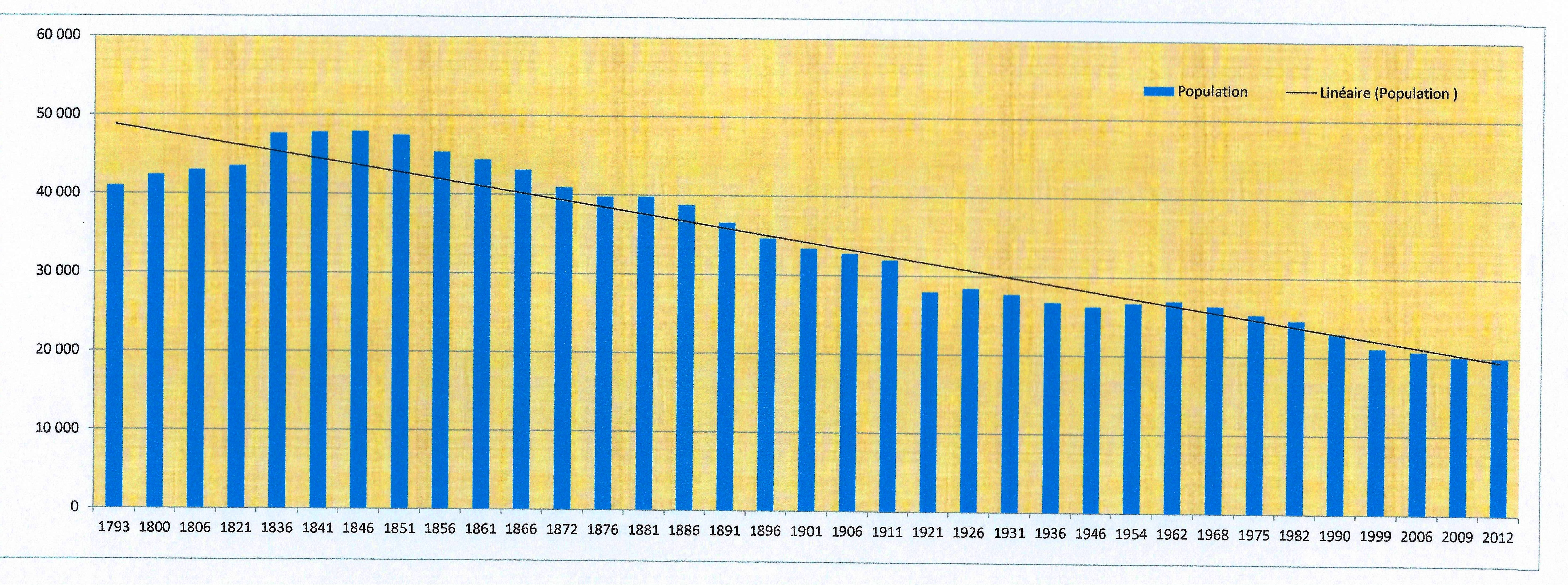 Evolution de la population des communes adhérantes à la communauté de commune du Pays Châtillonnais